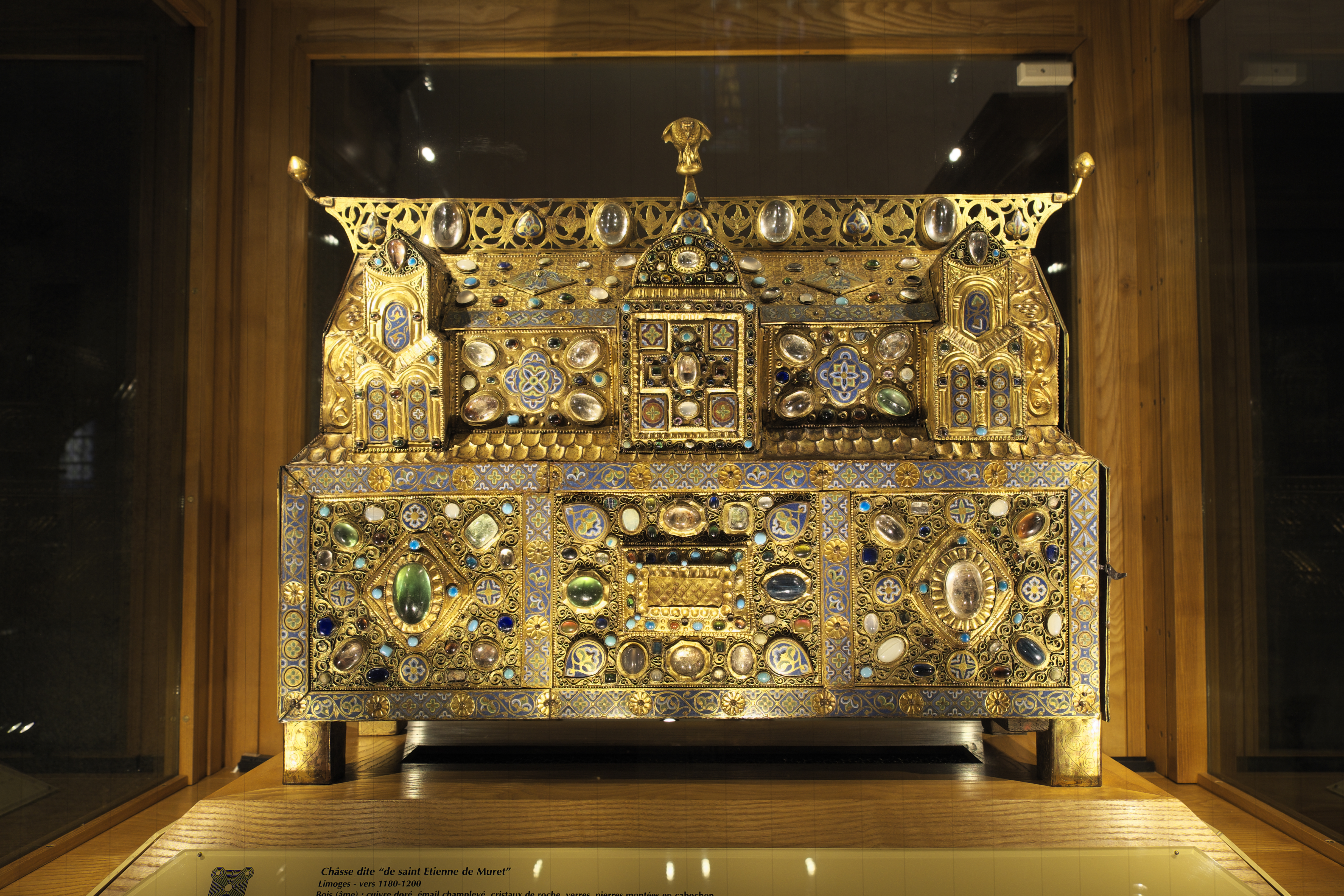 Katholische Pfarrkirche Saint-Antoine in Ambazac im Département Haute-Vienne (Nouvelle-Aquitaine/Frankreich), Reliquienschrein von Ambazac, zwischen 1180 und 1200